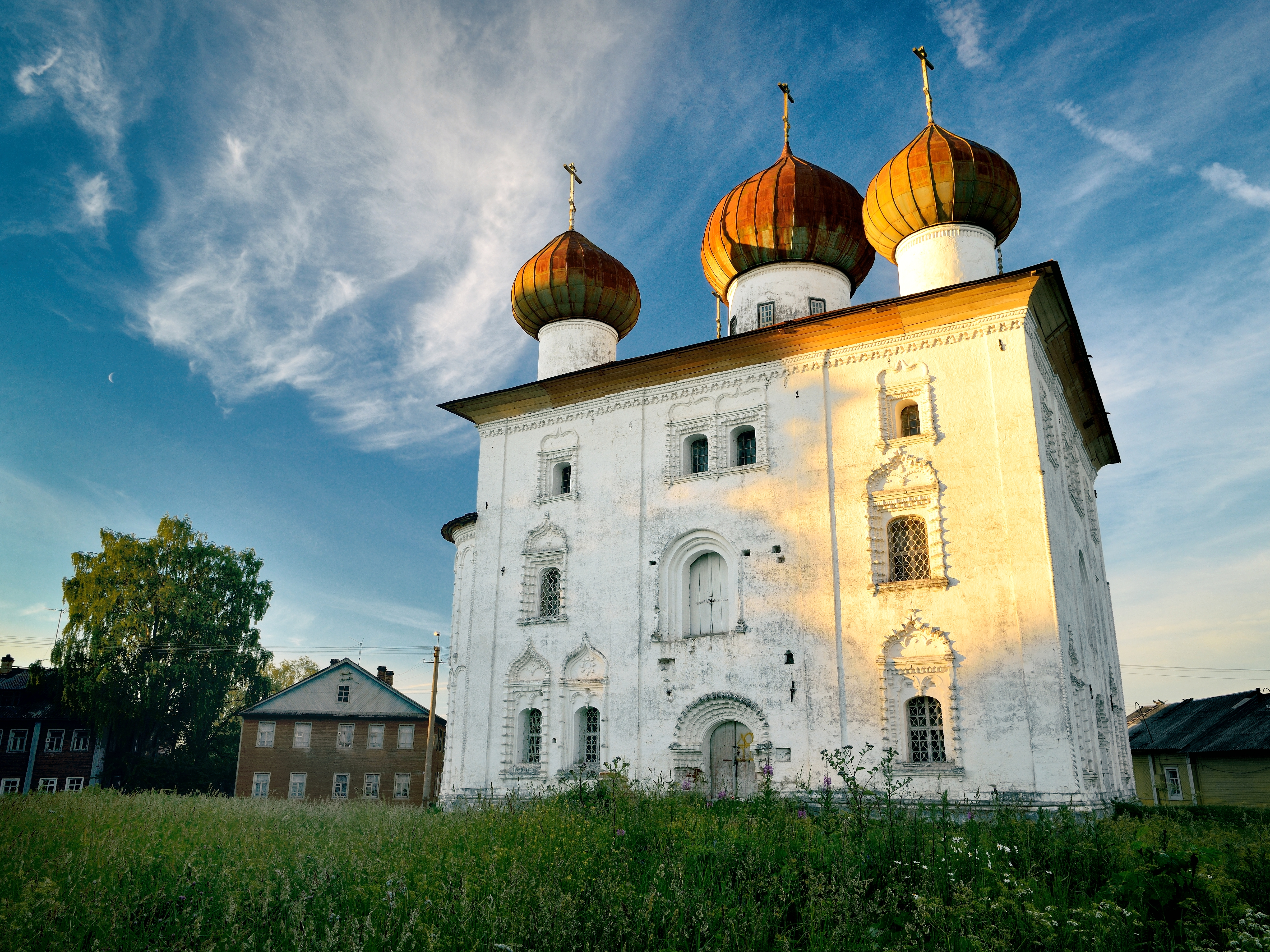 Церковь Благовещения: площадь Красноармейская, Каргополь, Каргопольский район, Архангельская область